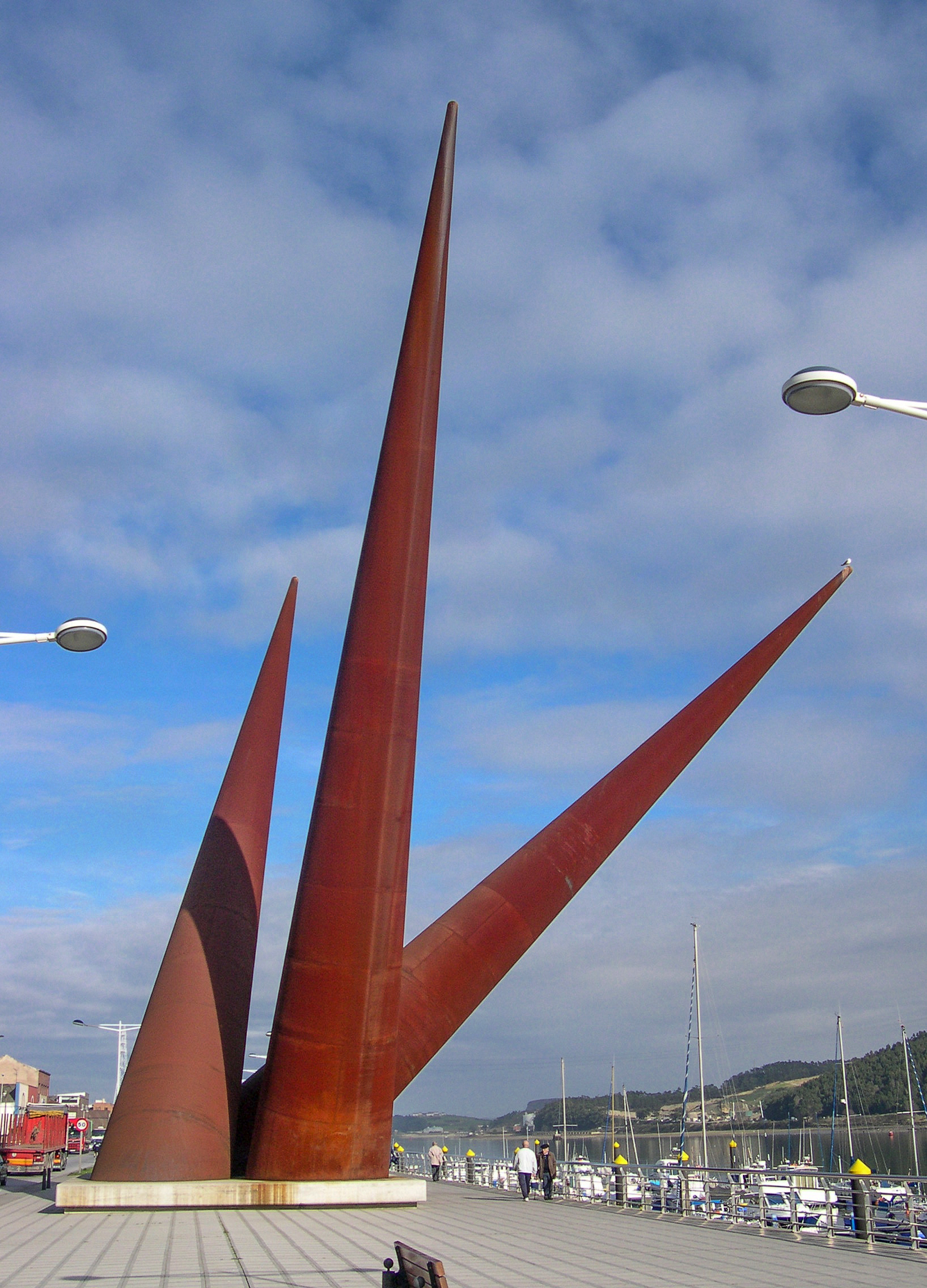 Escultura d'Avilés na ría